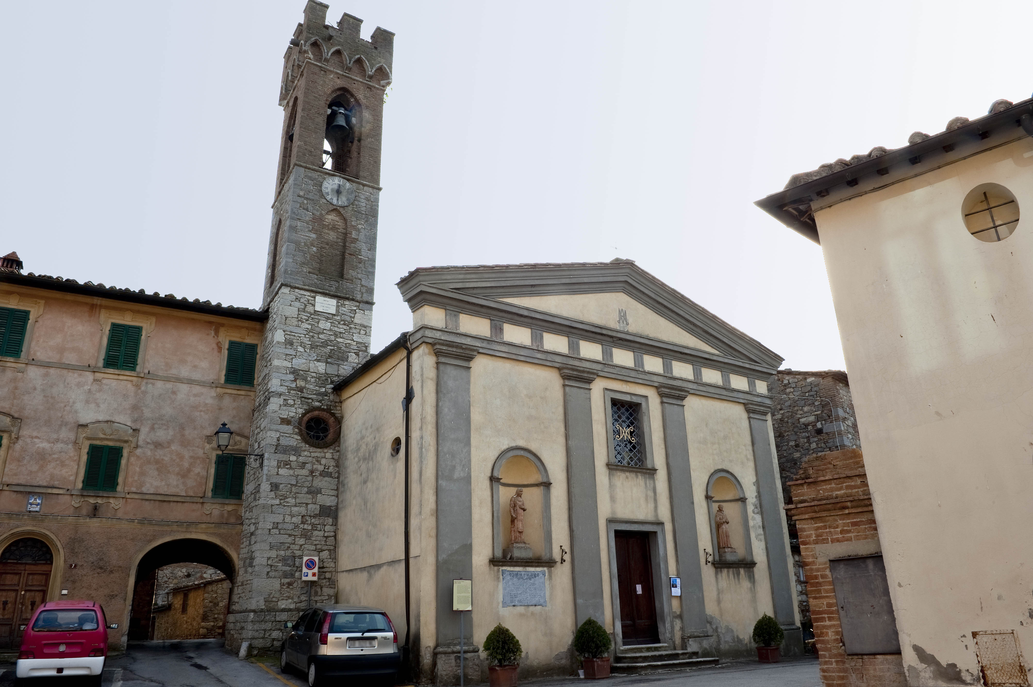 Pieve di Santa Maria a Villa a Sesta - Castenuovo Berardenga - Siena